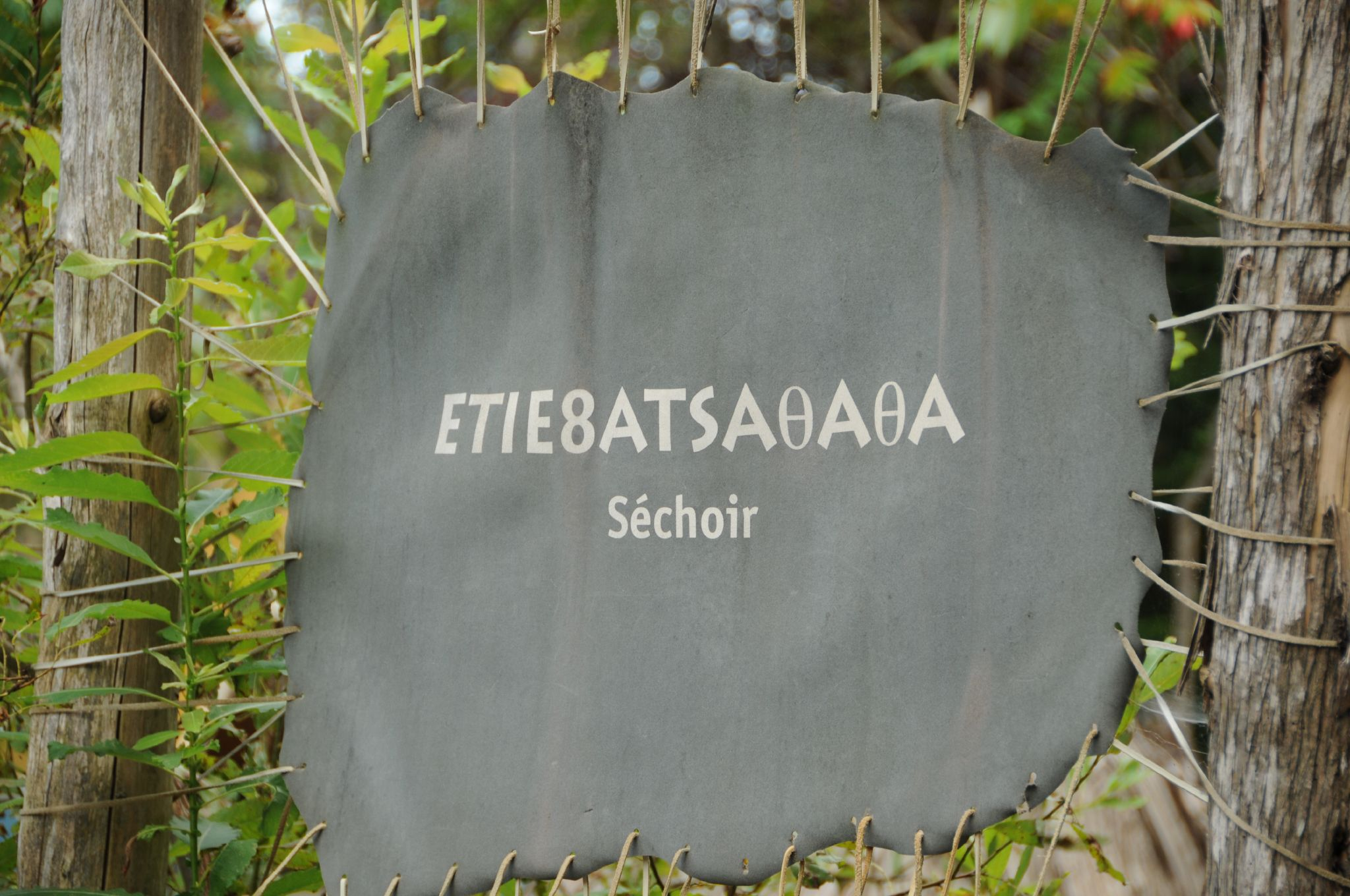 La réserve amérindienne Huron